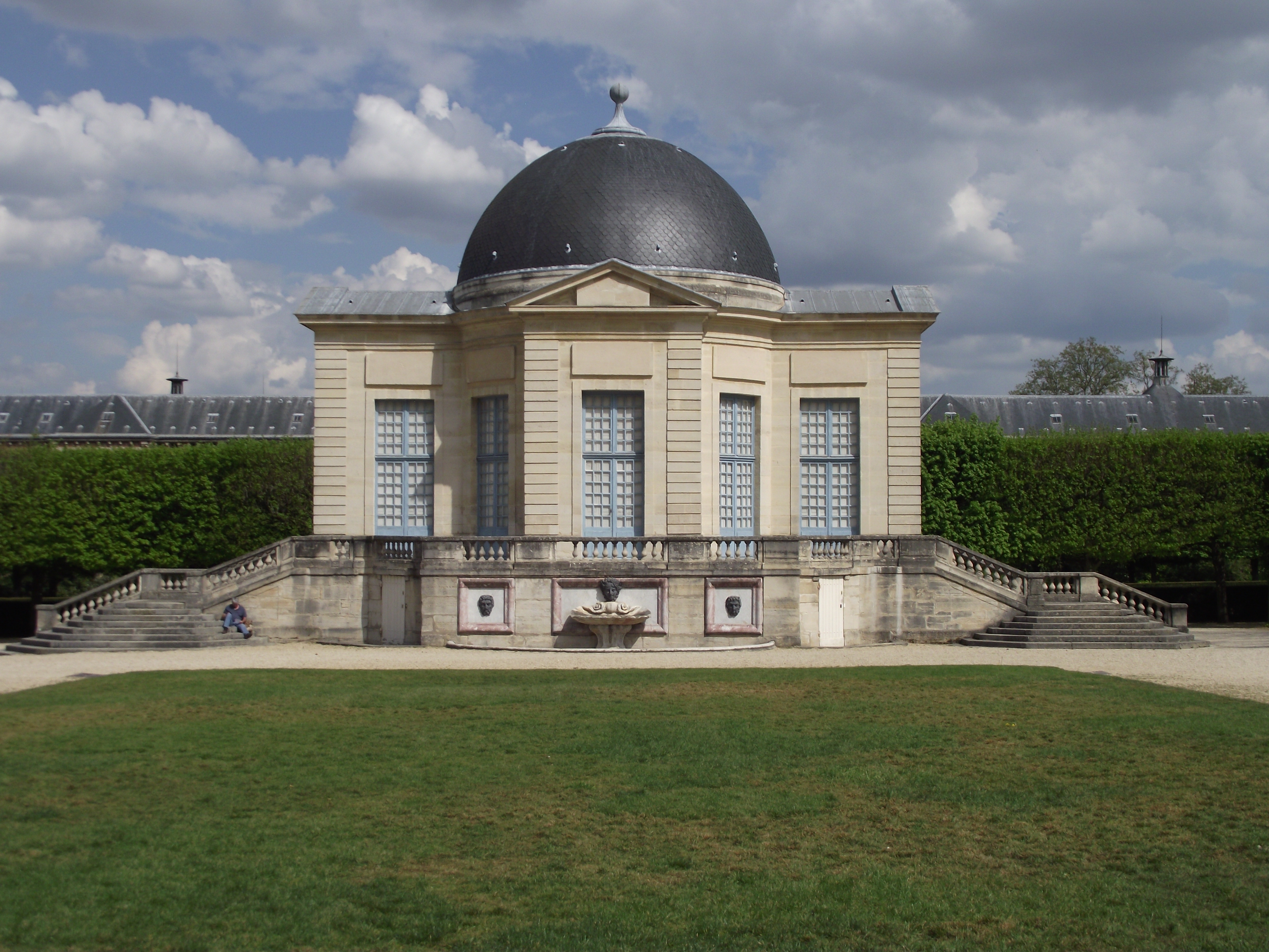 Sceaux, Pavillon de l'Aurore, XVII siècle